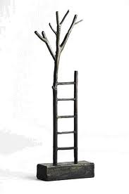 PREMIO AULA METAFORAS